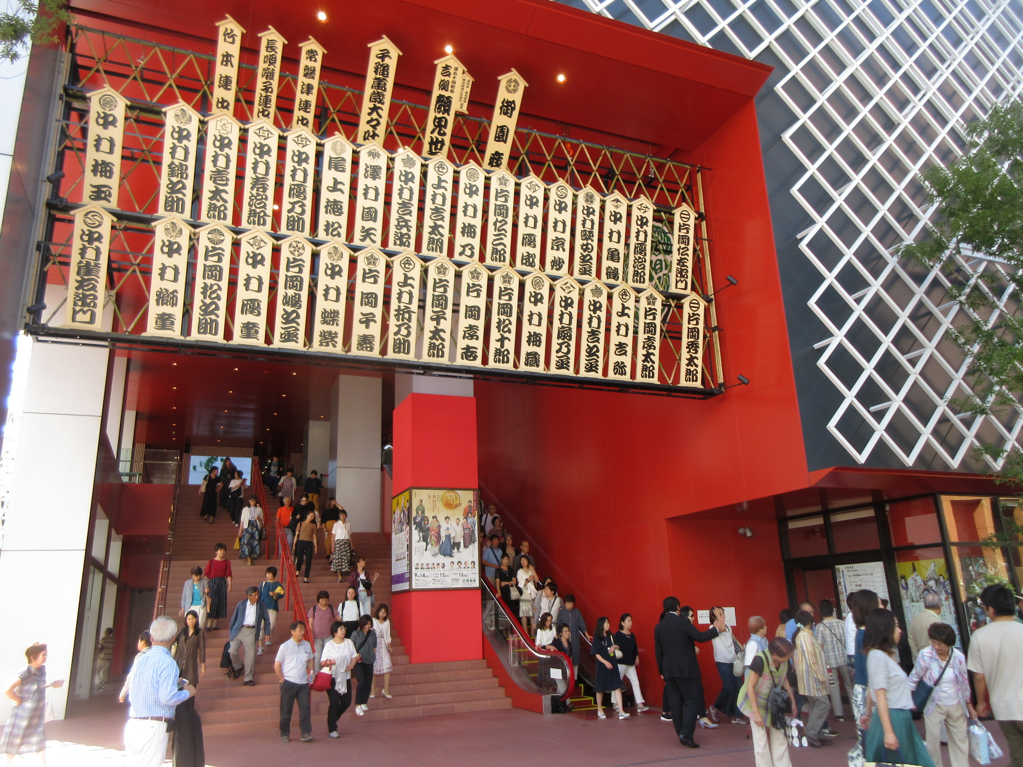 御園座（名古屋市中区栄）